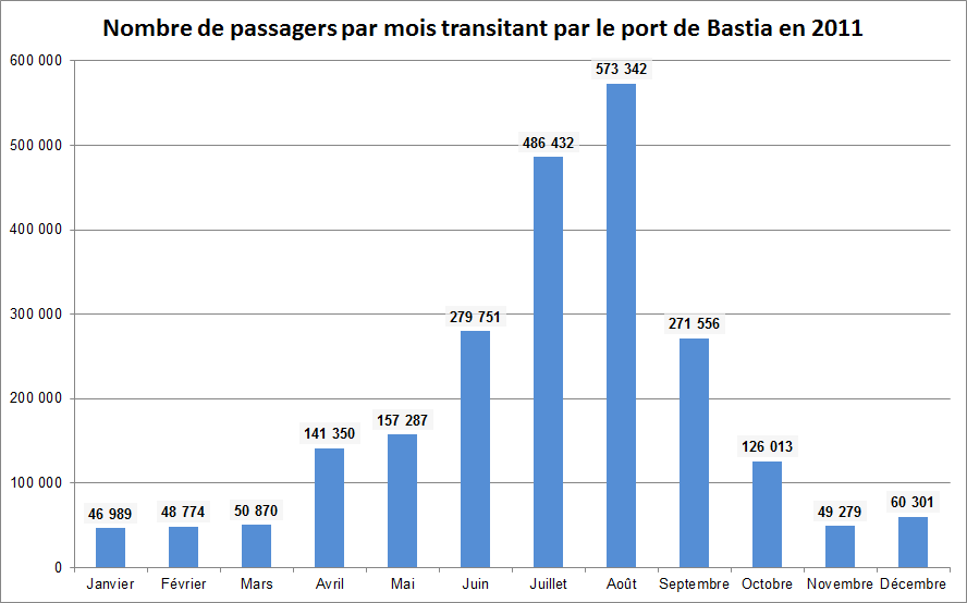 Source: CCI de Haute Corse, Statistiques Portuaires 2011